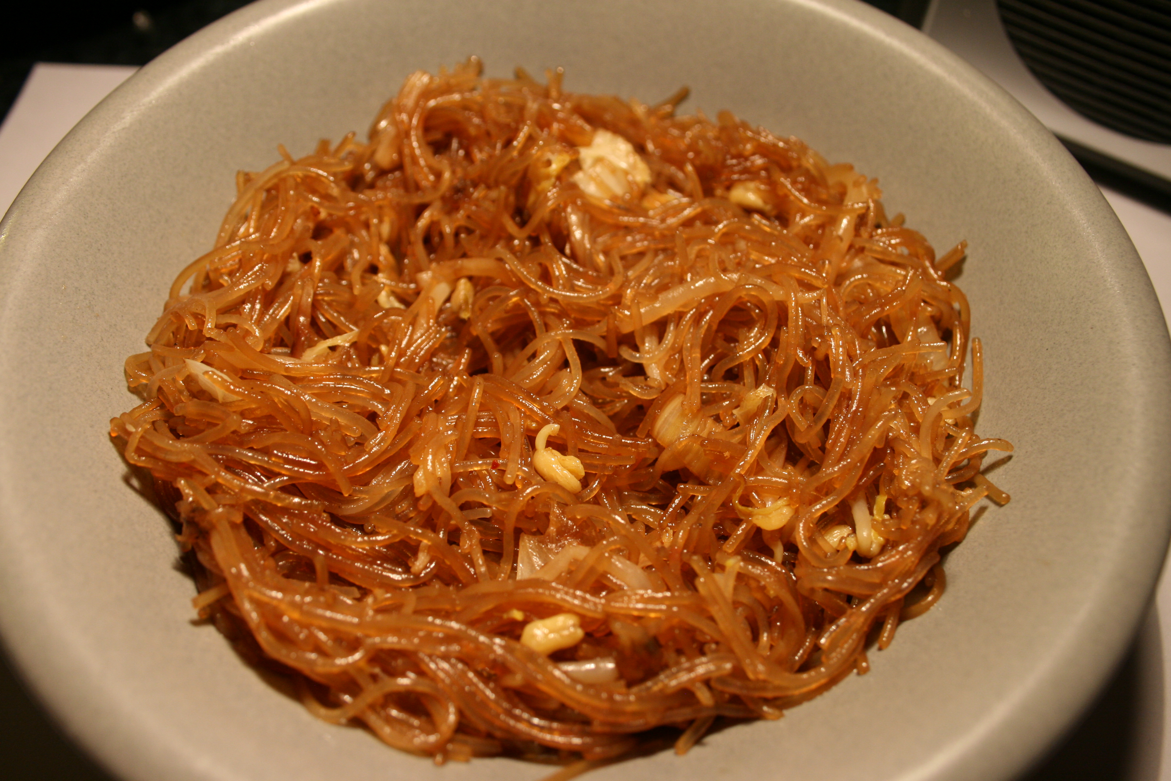 gebratene Glasnudeln mit weiteren asiatischen Ingredienzien